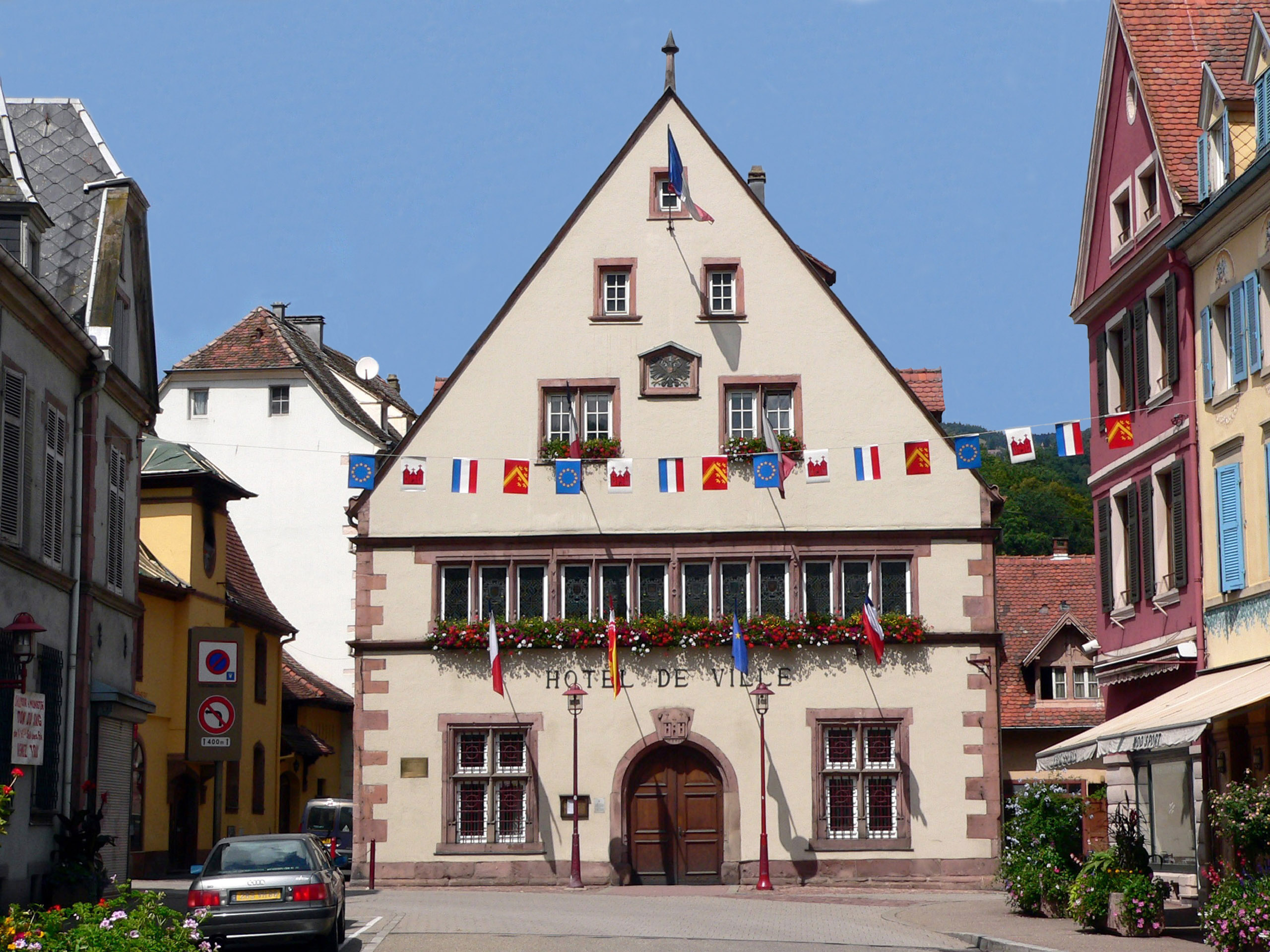 Mairie de Munster 1